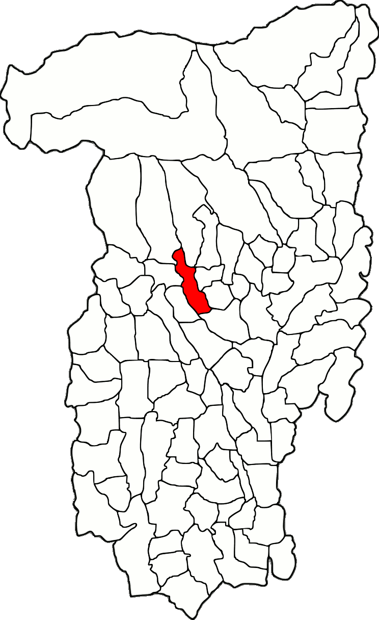 Lage der Gemeinde Tomșani im Kreis Vâlcea (RO).